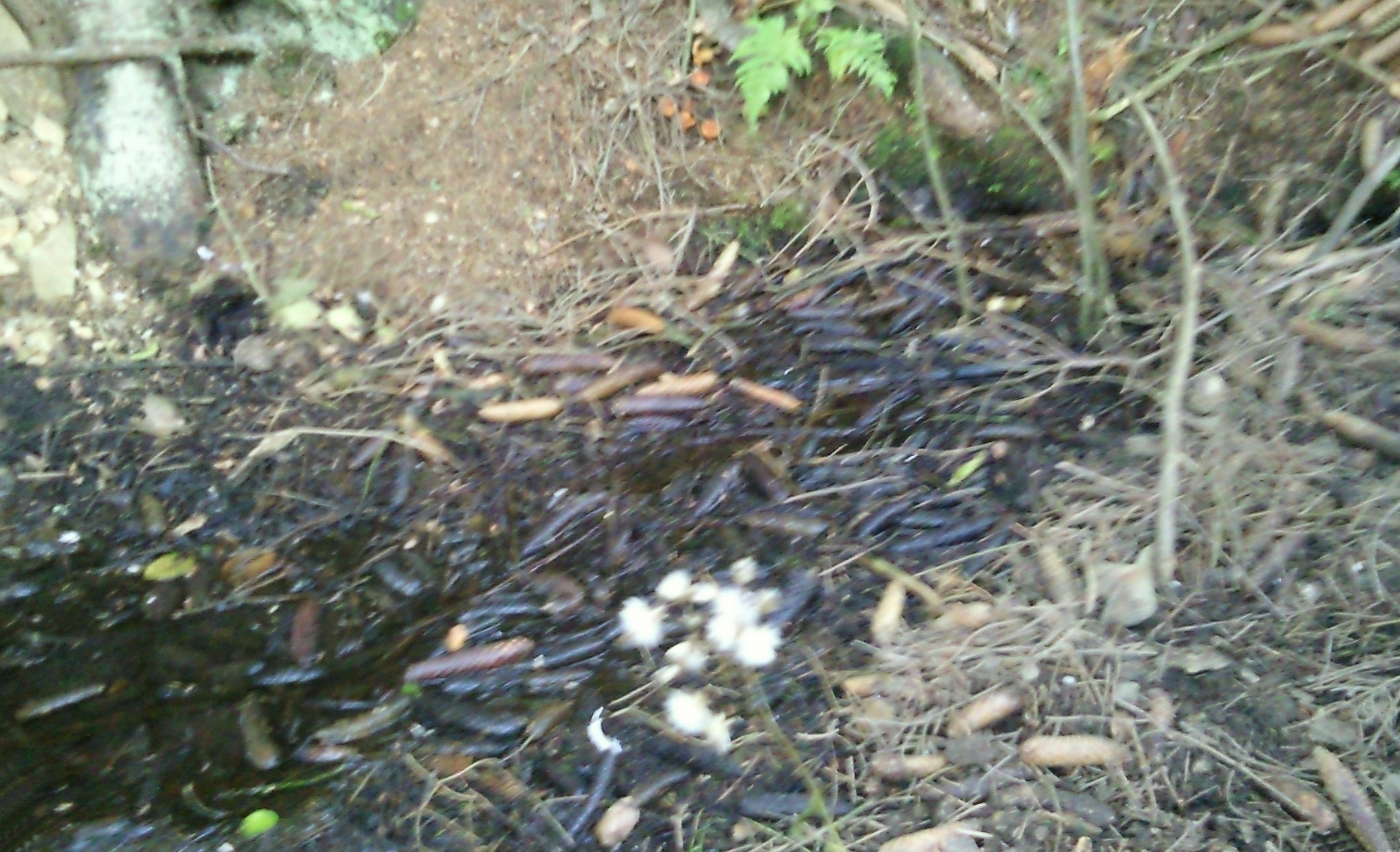 Austritt der Ludenrösche am Möllerteich